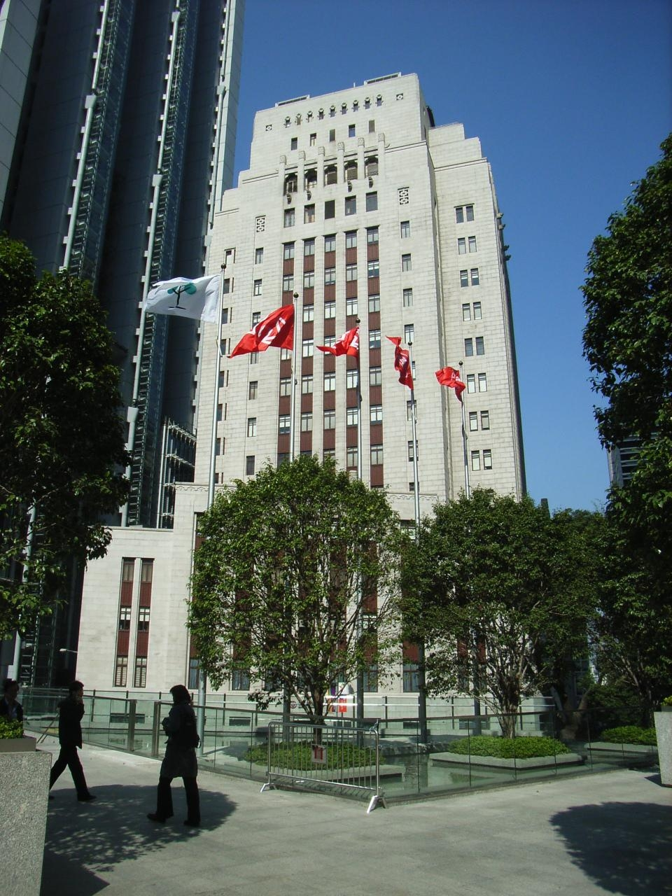 The old Bank of China building, Central, Hong Kong 舊zh:中國銀行大廈, 位於皇后大道中2號 附近建築物包括: 立法局大樓, 遮打花園, 長江集團中心, 特區終審法院, 匯豐銀行總行大廈, 及新zh:中銀大廈.